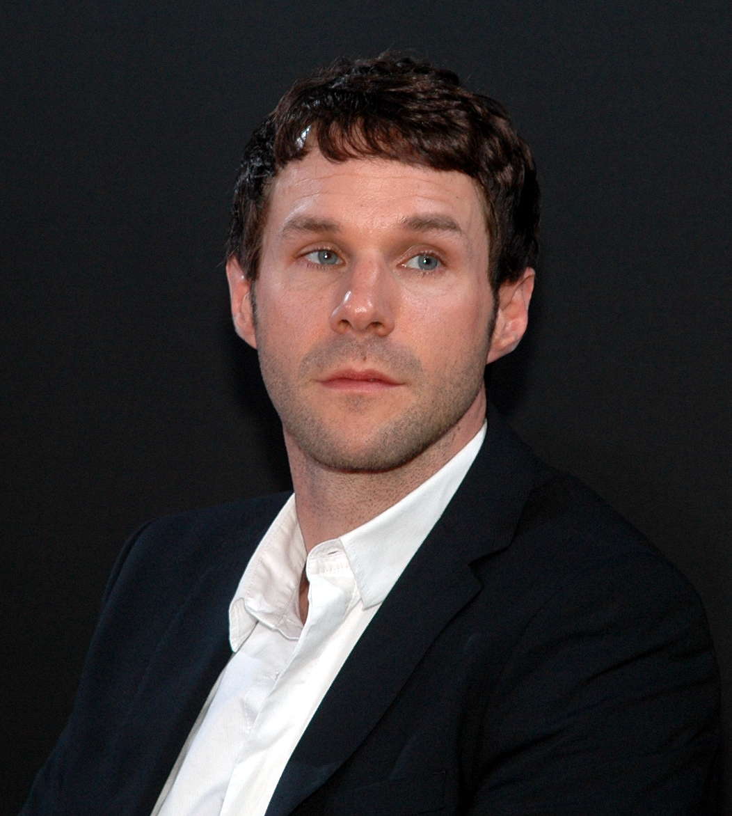 Toke Constantin Hebbeln bei seiner Filmvorstellung "Wir wollten aufs Meer" auf dem Filmfest München 2012